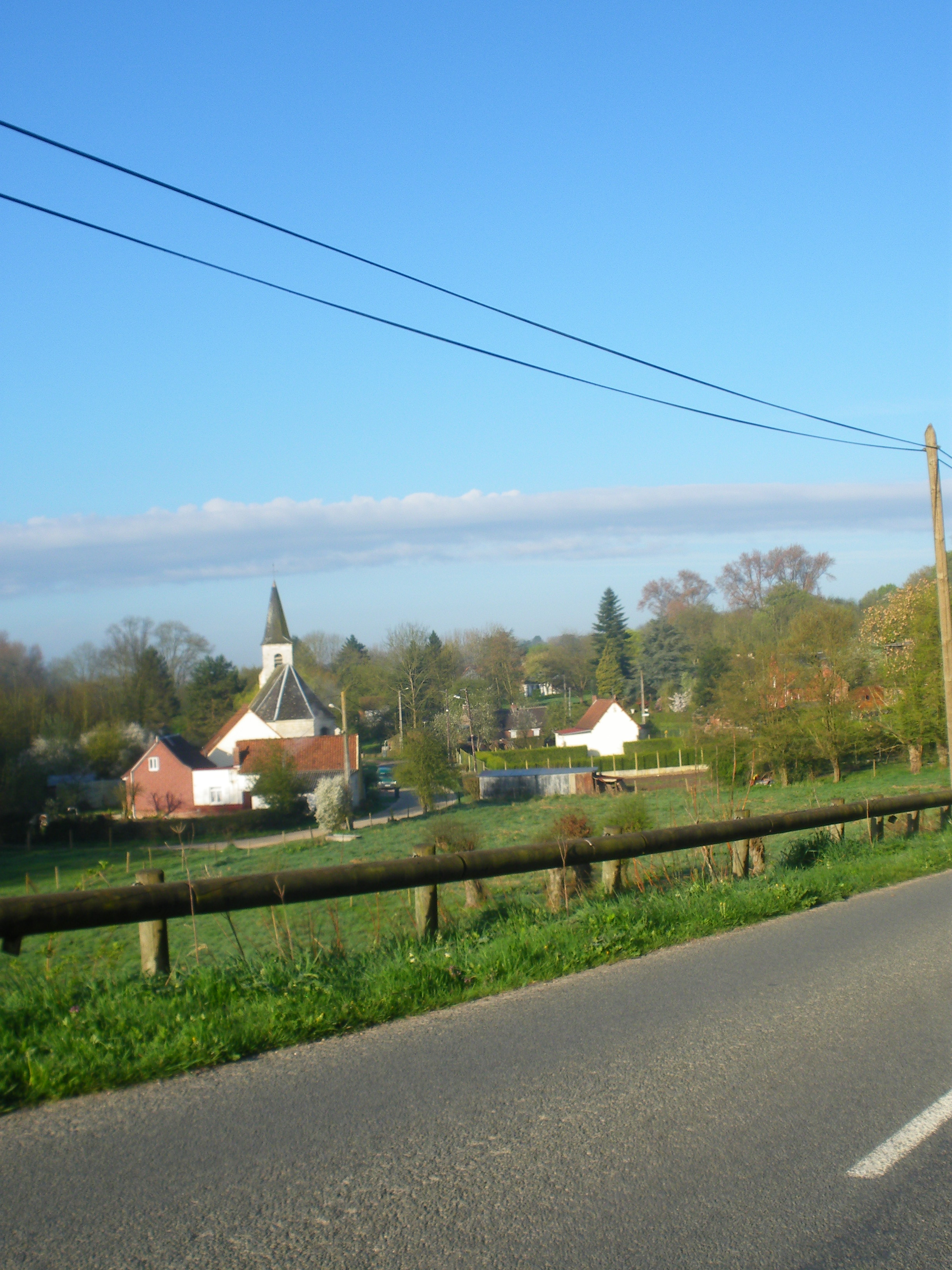 Vue de la commune de Grincourt-lès-Pas.